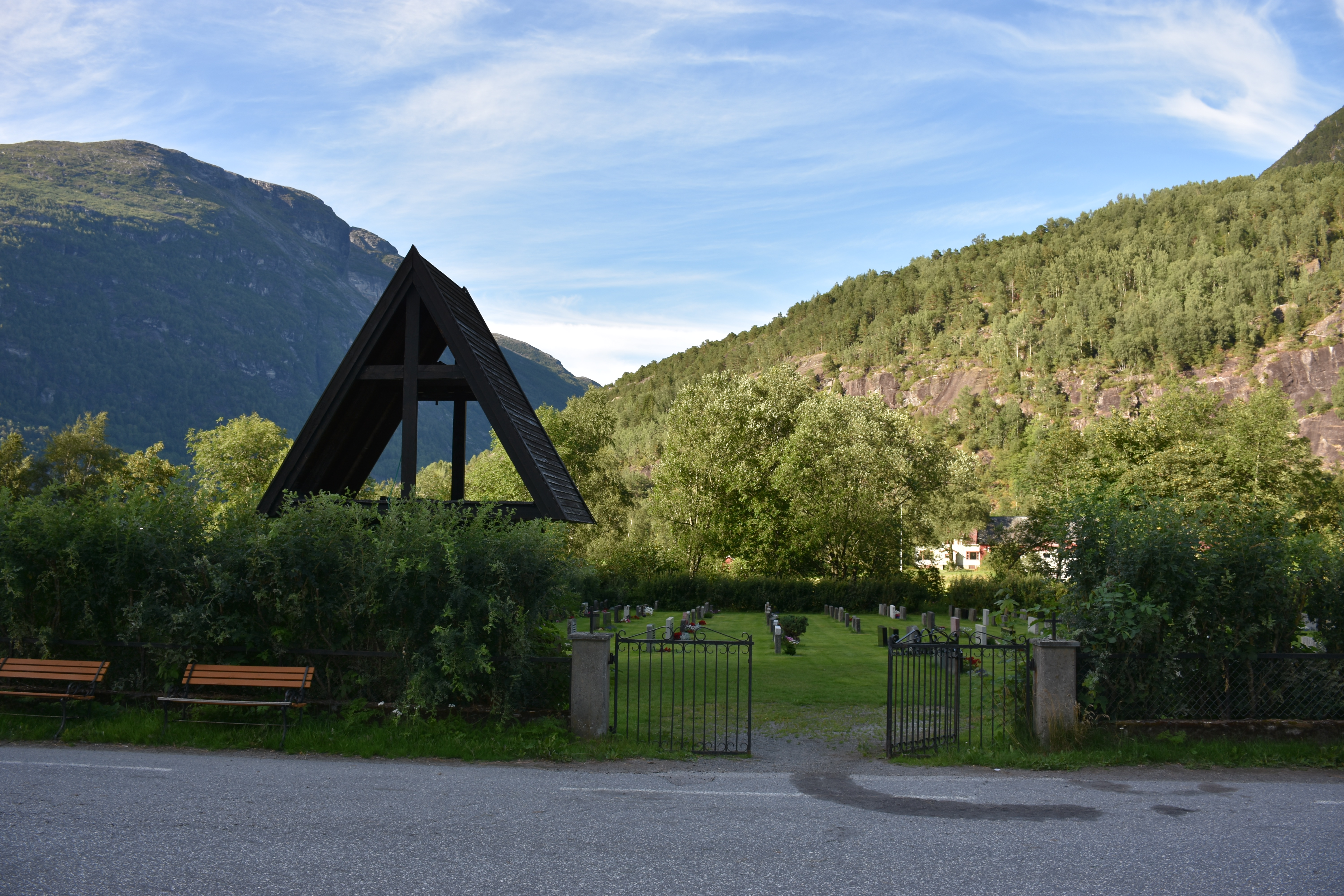 Jogardsbøen gravplass i utkanten av Hellsylt. Foran går Bygda (Fylkesvei 80).